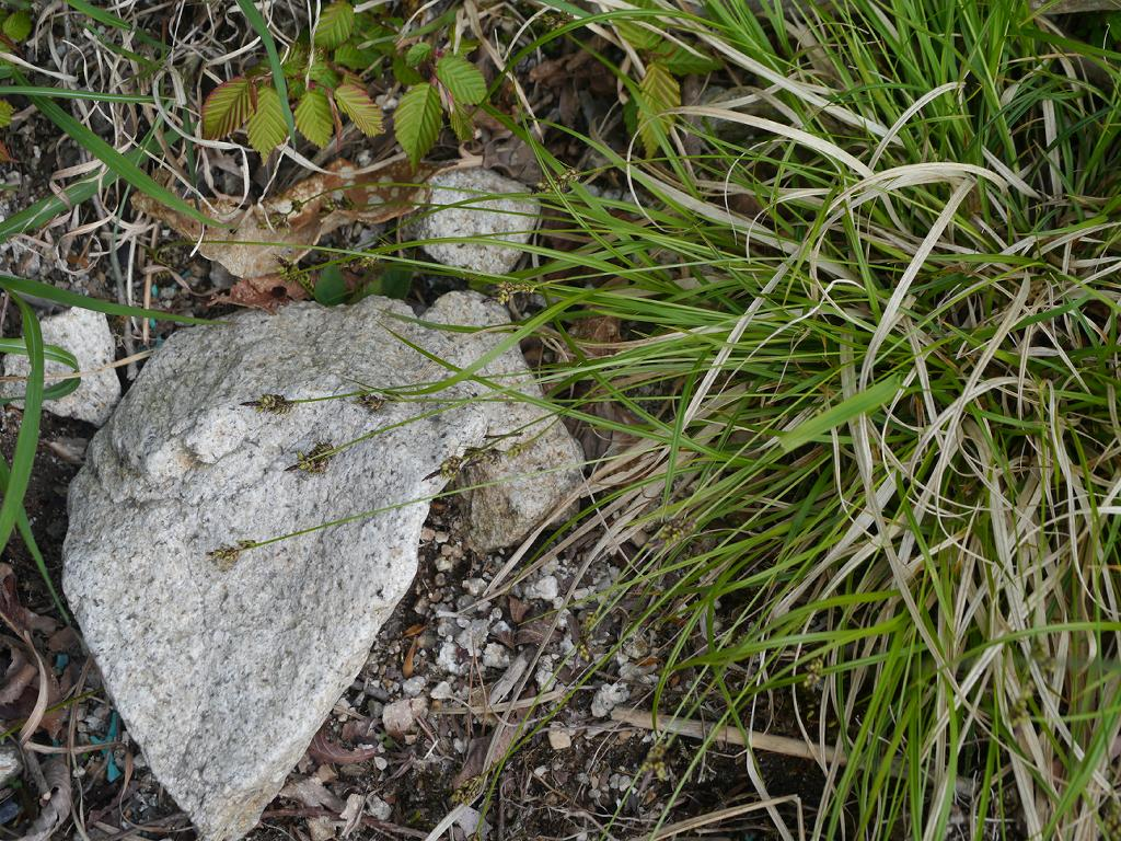 Carex oxyandra：ヒメスゲ 2018/05/04 滋賀県甲賀市：Kouga City, Siga Pref.